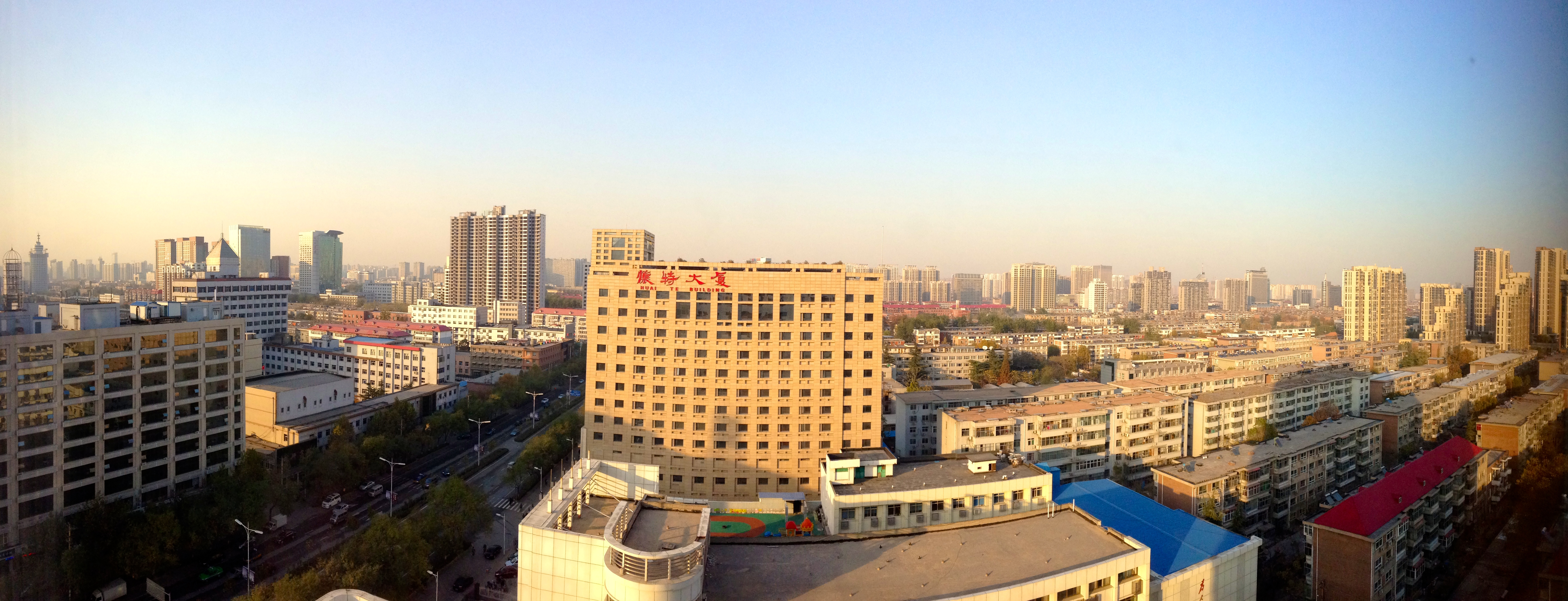 懷特全景